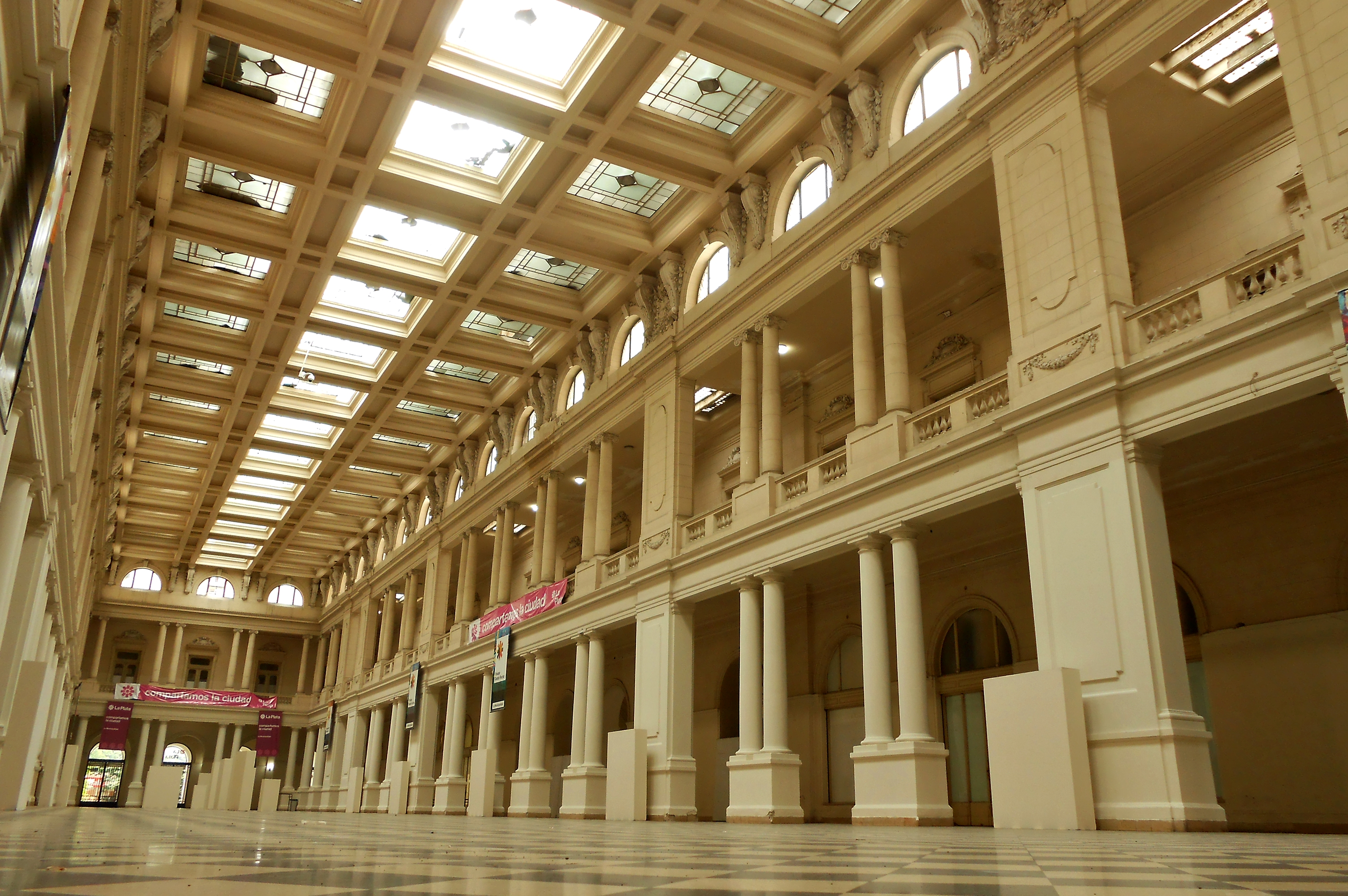 Pasaje Dardo Rocha: interior - La Plata - Buenos Aires - Argentina